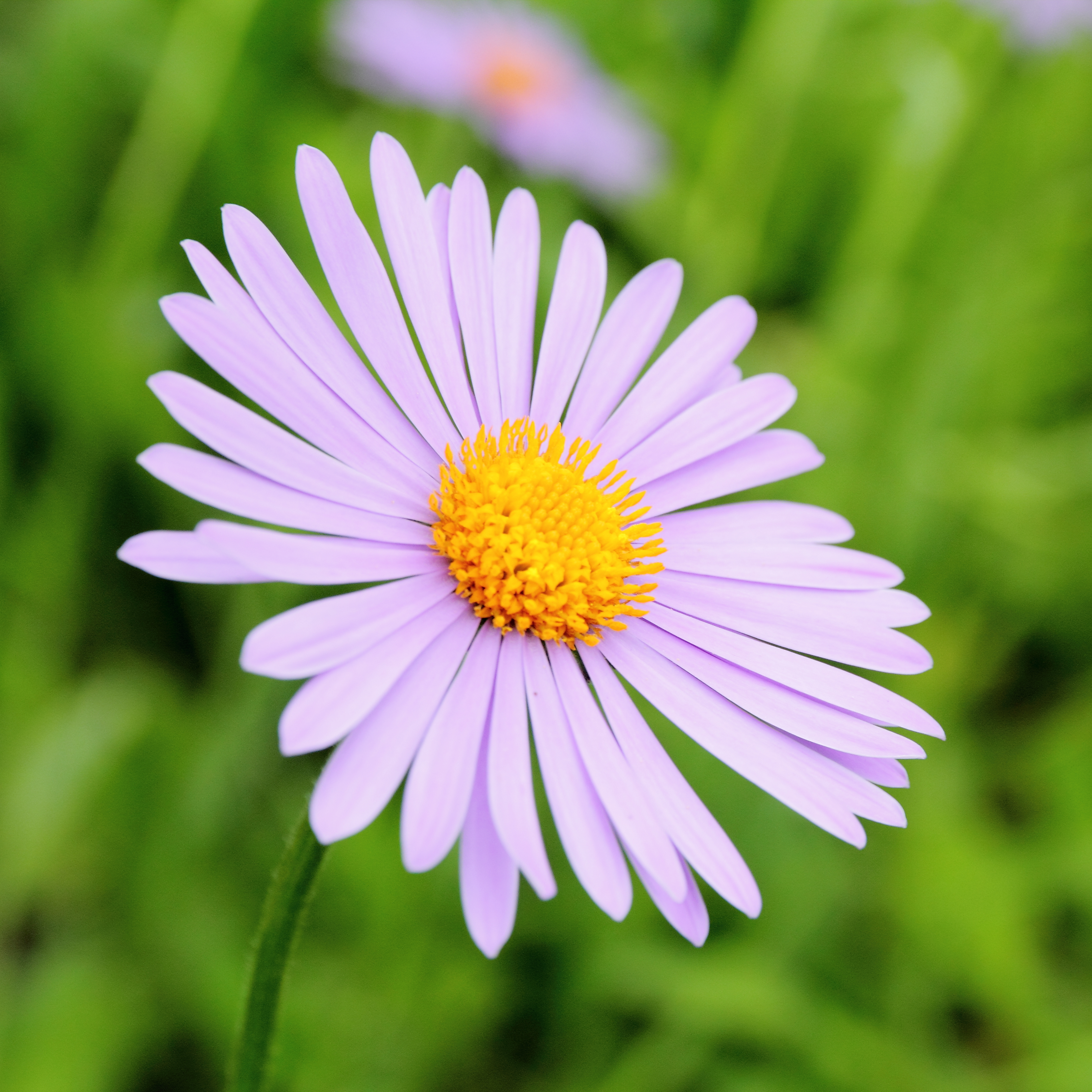 Aster tongolensis i Bergianska trädgården.